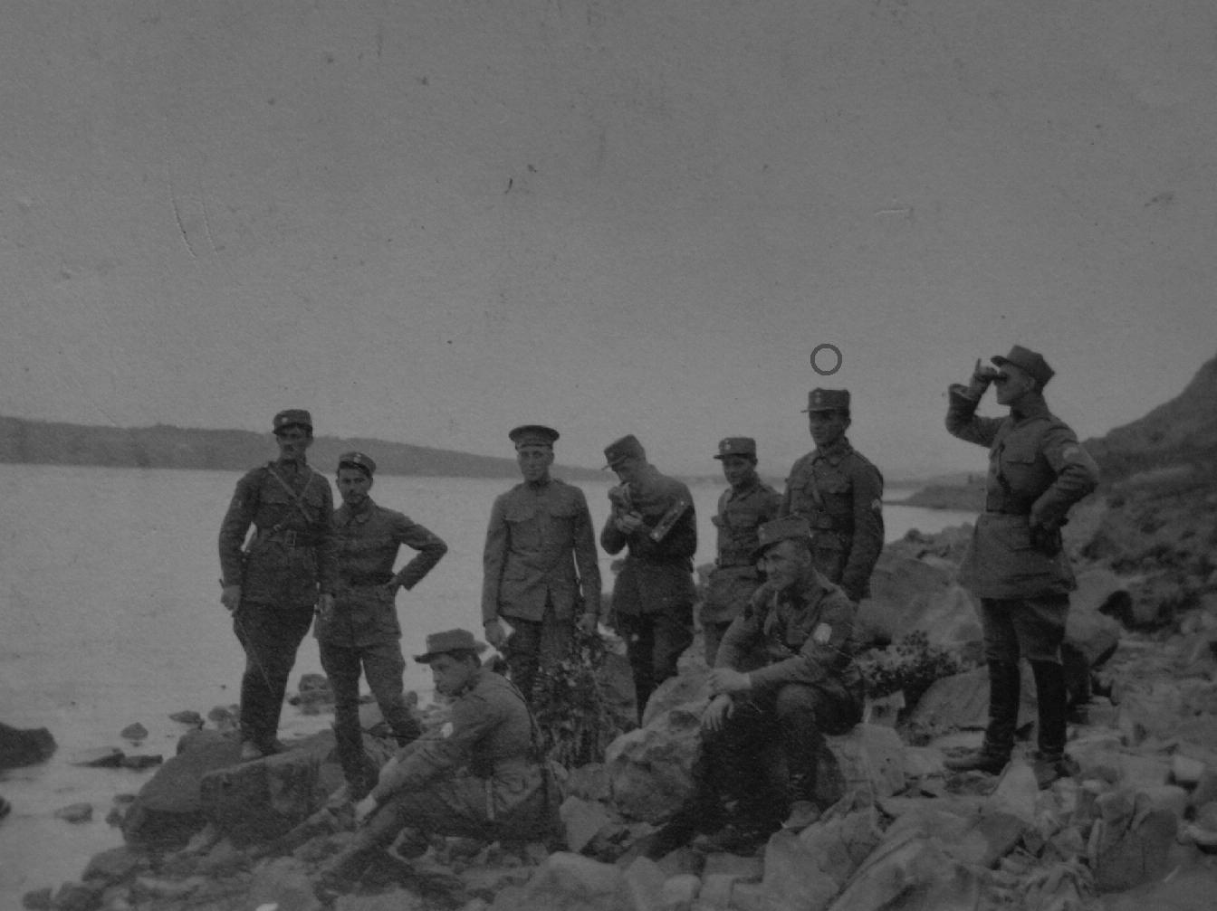 Alois Laub (označen) v hodnosti nadporučíka v roce 1919. Snímek patrně pořízen na břehu Bajkalu.